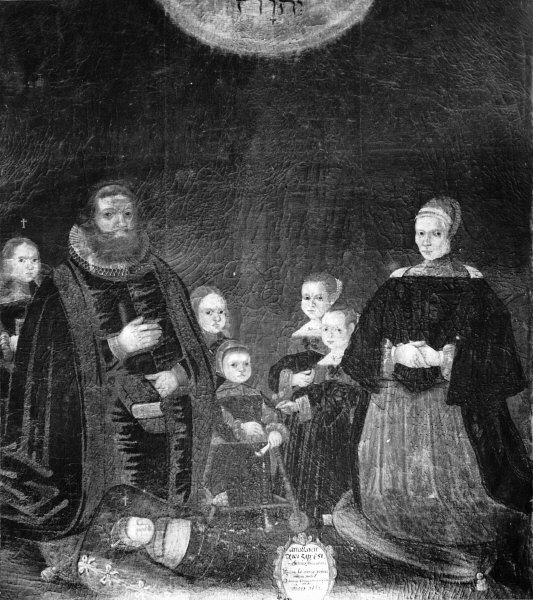 Epitafium över prosten Ansenius med familj. Kategori: (09) EpitafierEpitafium över prosten Ansenius med familj.